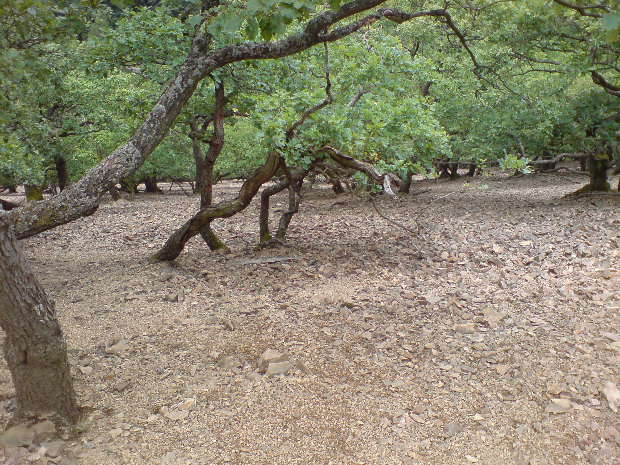 Bizarre Baum und Schuttlandschaft auf dem Leienberg bei Hinzweiler.